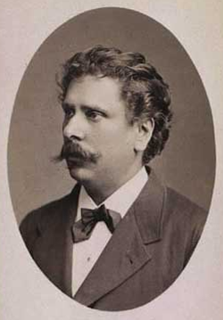 Gustav Adolph Peter Lembcke (1844-1899) var en dansk violinist, pianist, dirigent og komponist a danish composer and musician